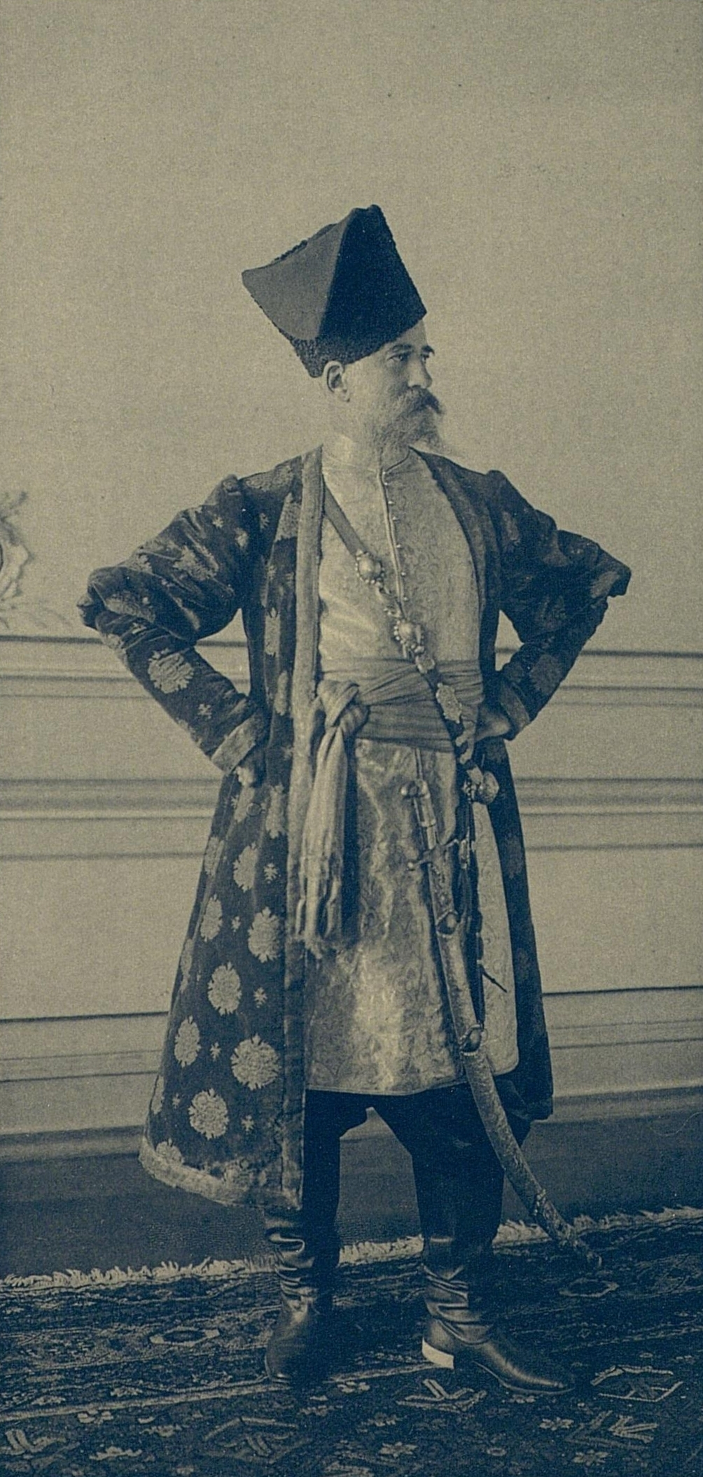 Свиты Его Величества генерал-майор, Барон Александр Егорович Мейендорф, командир Собственного Его Величества конвоя (Сибирский казак времен Царя Алексея Михайловича).